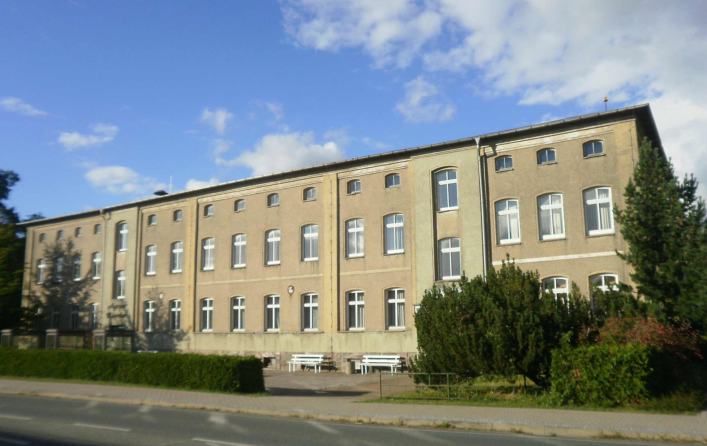 Schnitterkaserne in Alt Schwerin, 1904 vom Gutsbesitzer H. Schlutius erbaut, Unterbringung für ca. 100 Saisonarbeiter (Schnitter), Gebäude wurde in den 1960'ern dreiseitig verputzt, nur auf der Rückseite ist das originale Klinkerfassade erhalten, nach 1945 Nutzung als Schule, Kindergarten, Gemeindebüro, Dorfgaststätte, Konsum und Museum, original DDR-Dauerausstellung „5000 Jahre Landwirtschaft in Mecklenburg“ von 1988 als "Museum im Museum" erhalten.